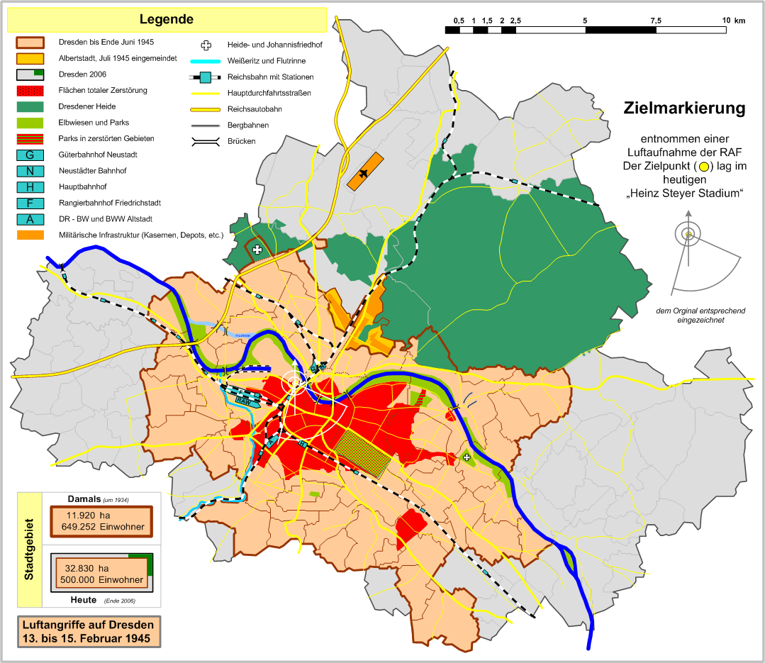 Folgen der Luftangriffe vom 13. bis 15. Februar 1945 auf Dresden